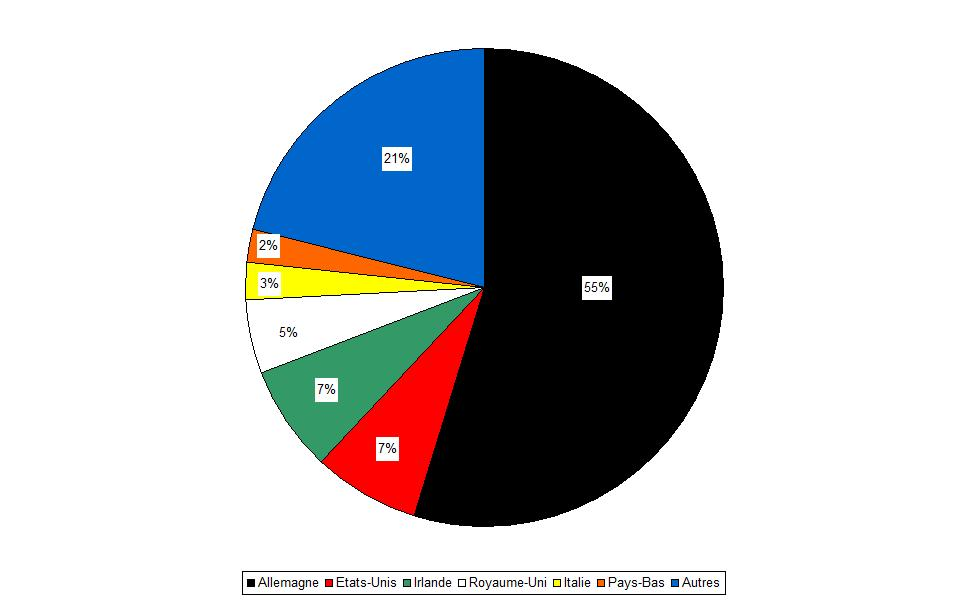 Origine des habitants de Delphos (Ohio - Etats-Unis)